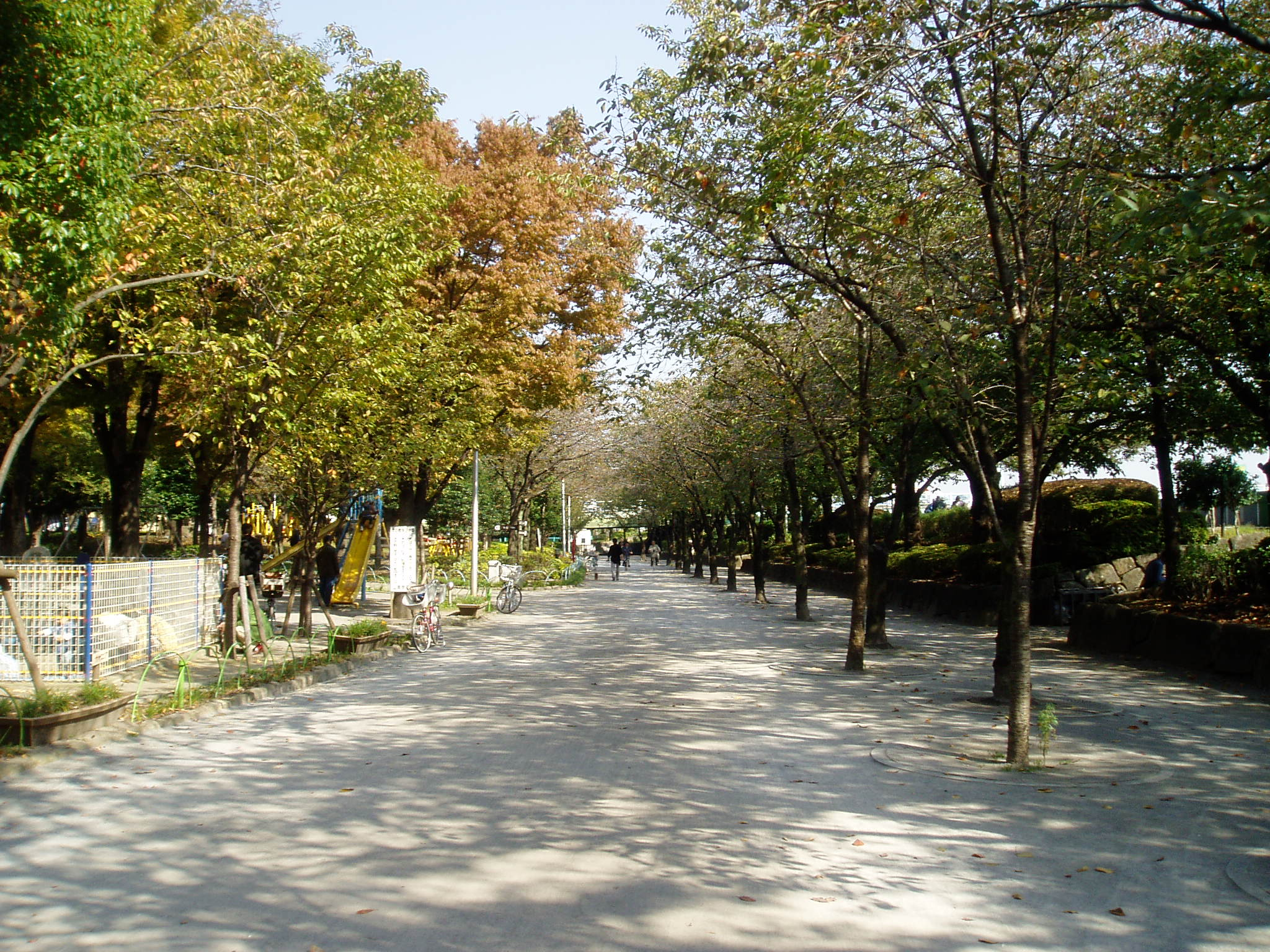 Sumida Park (隅田公園) in Hanakawado, Taito, Tokyo, Japan